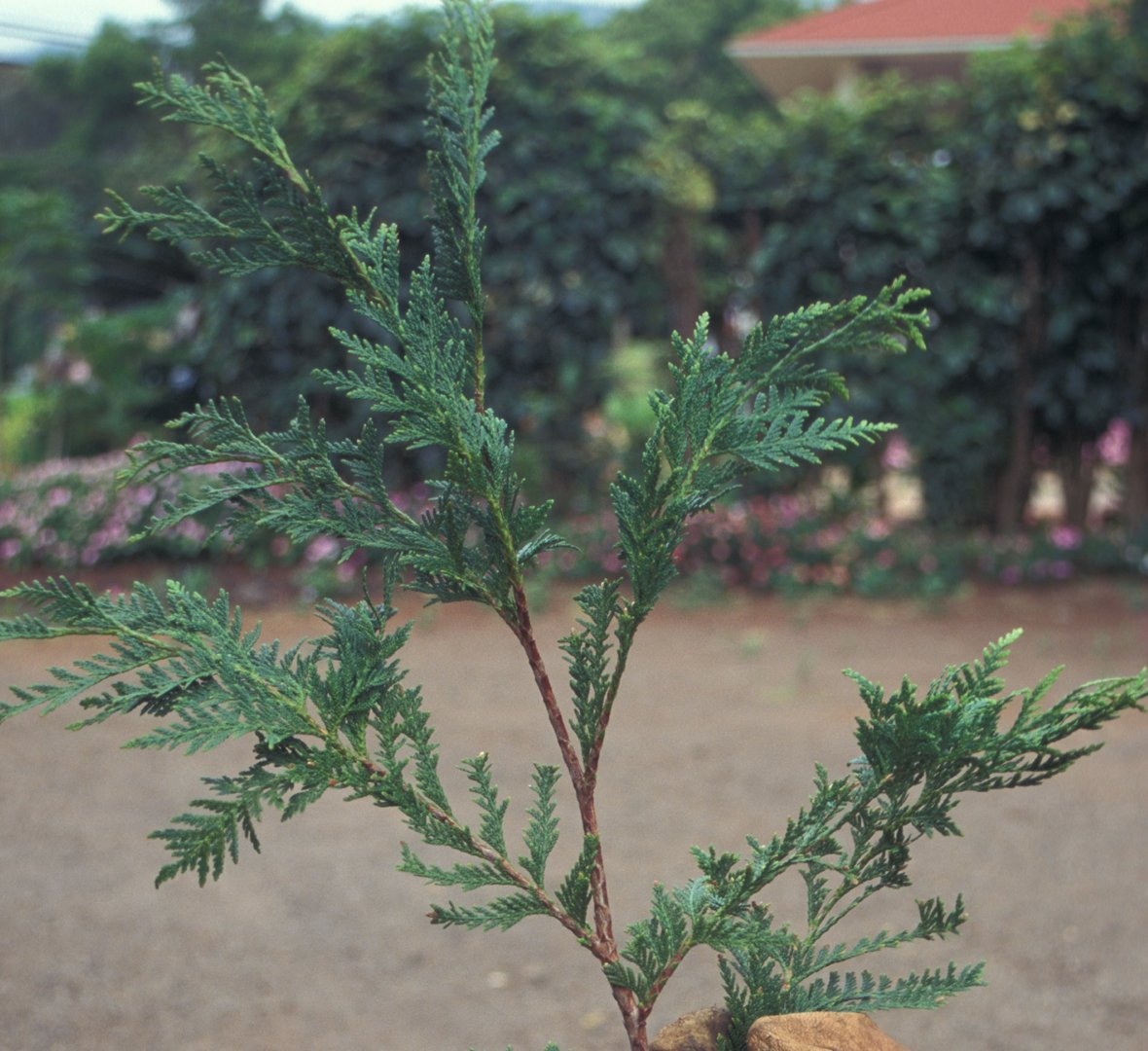 ramo di Thuja occidentalis L'immagine rappresenta un ramo di Thuja occidentalis nota col nome comune di Tuia La foto è stata tratta dal sito: Licenza